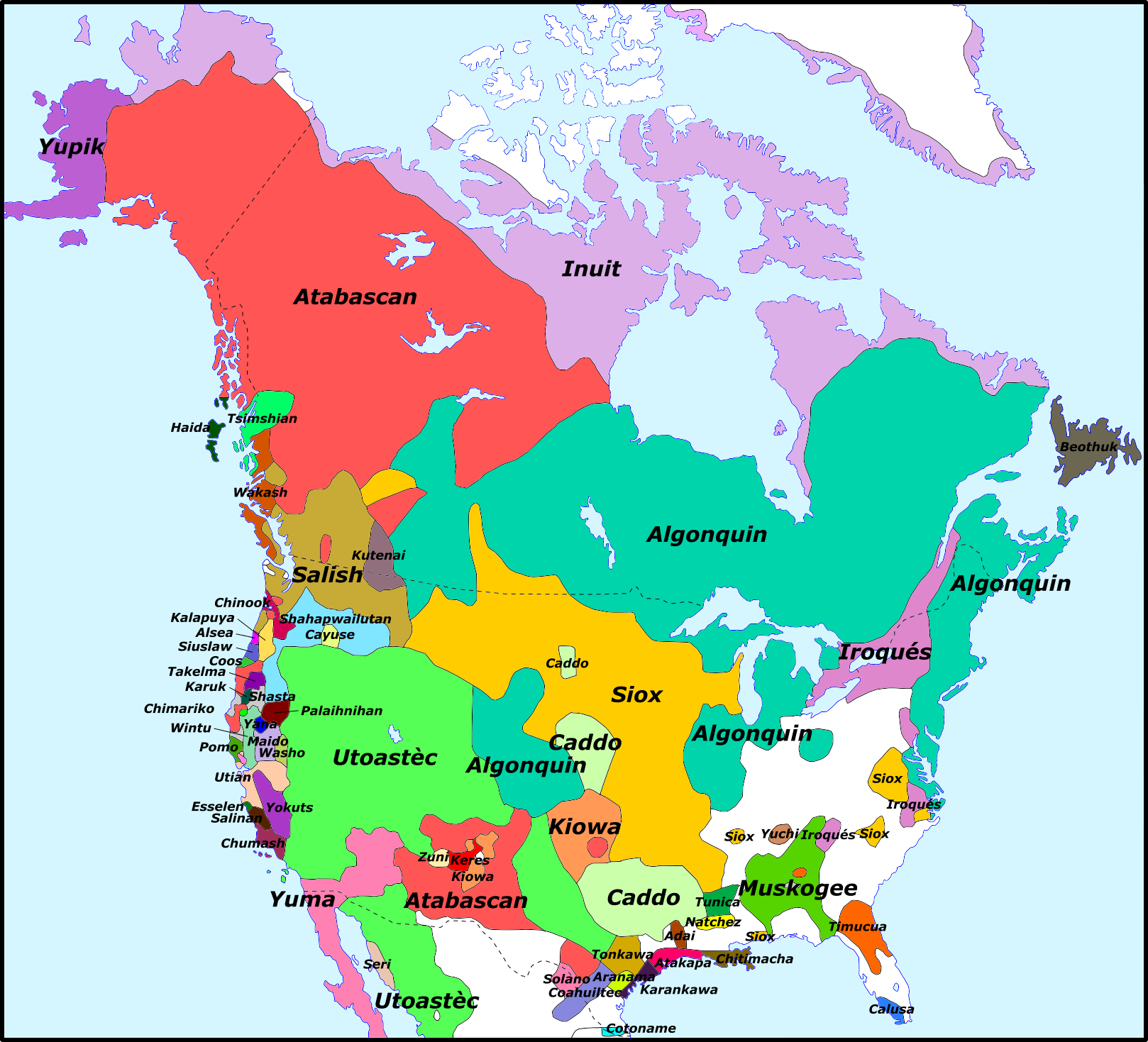 Familha de lengas en America dau Nòrd a l'arribada deis Europèus